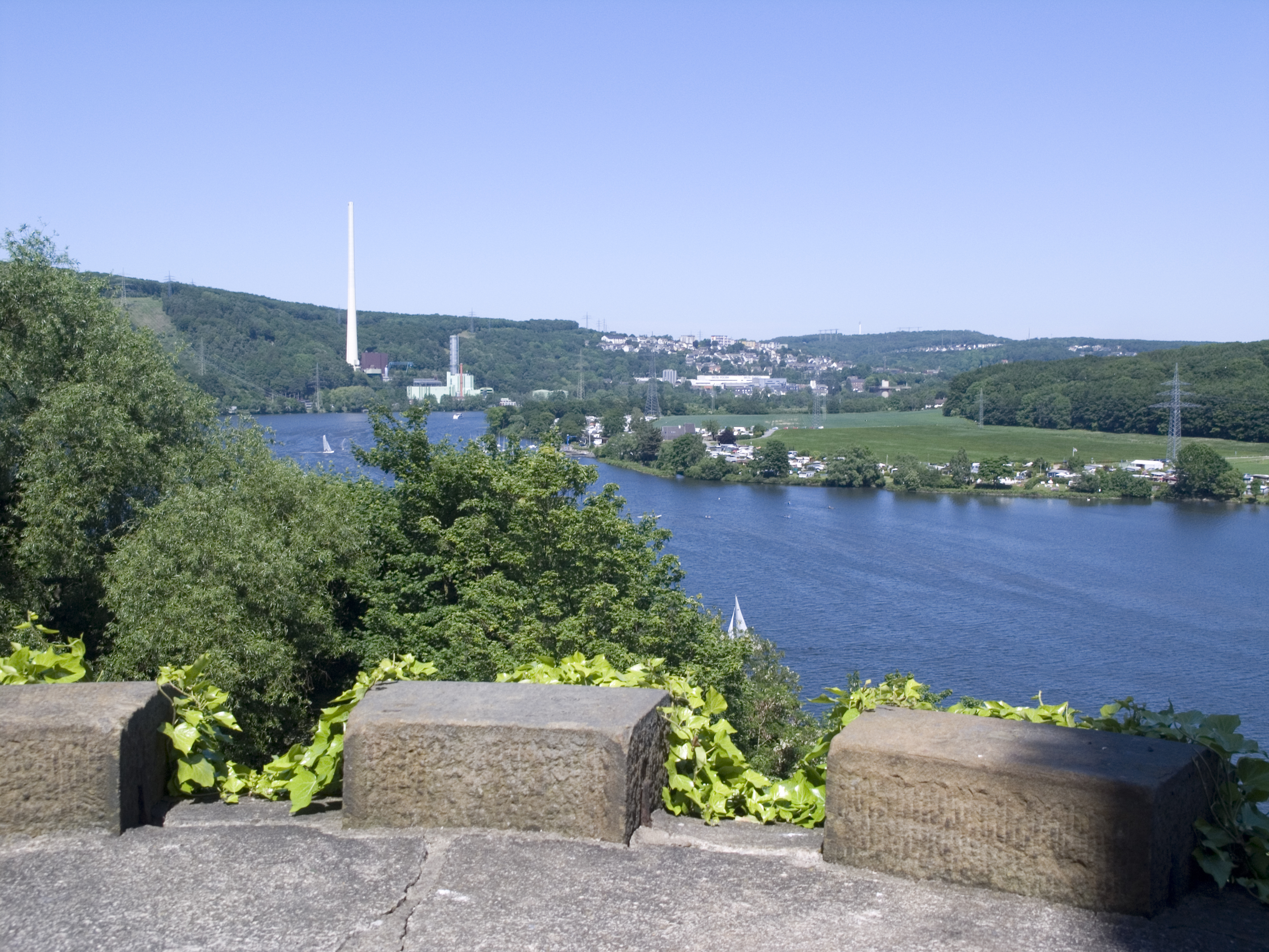 Северный Рейн - Вестфалия, Веттер (Рур) - крепость Бург Ветер (вид на на водохранилище Харкортзее)